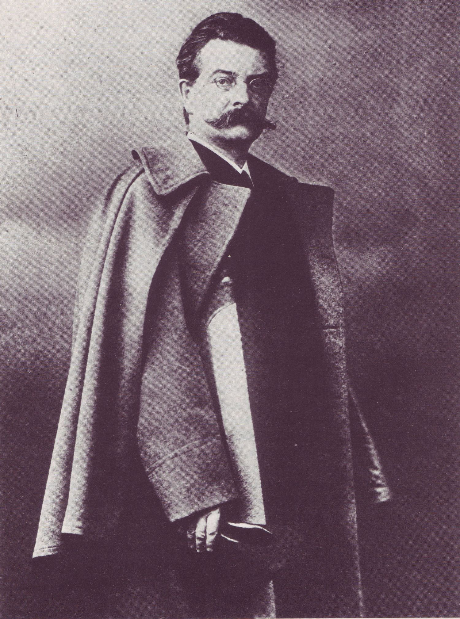 Franz Schwechten (1841-1924), about 1895